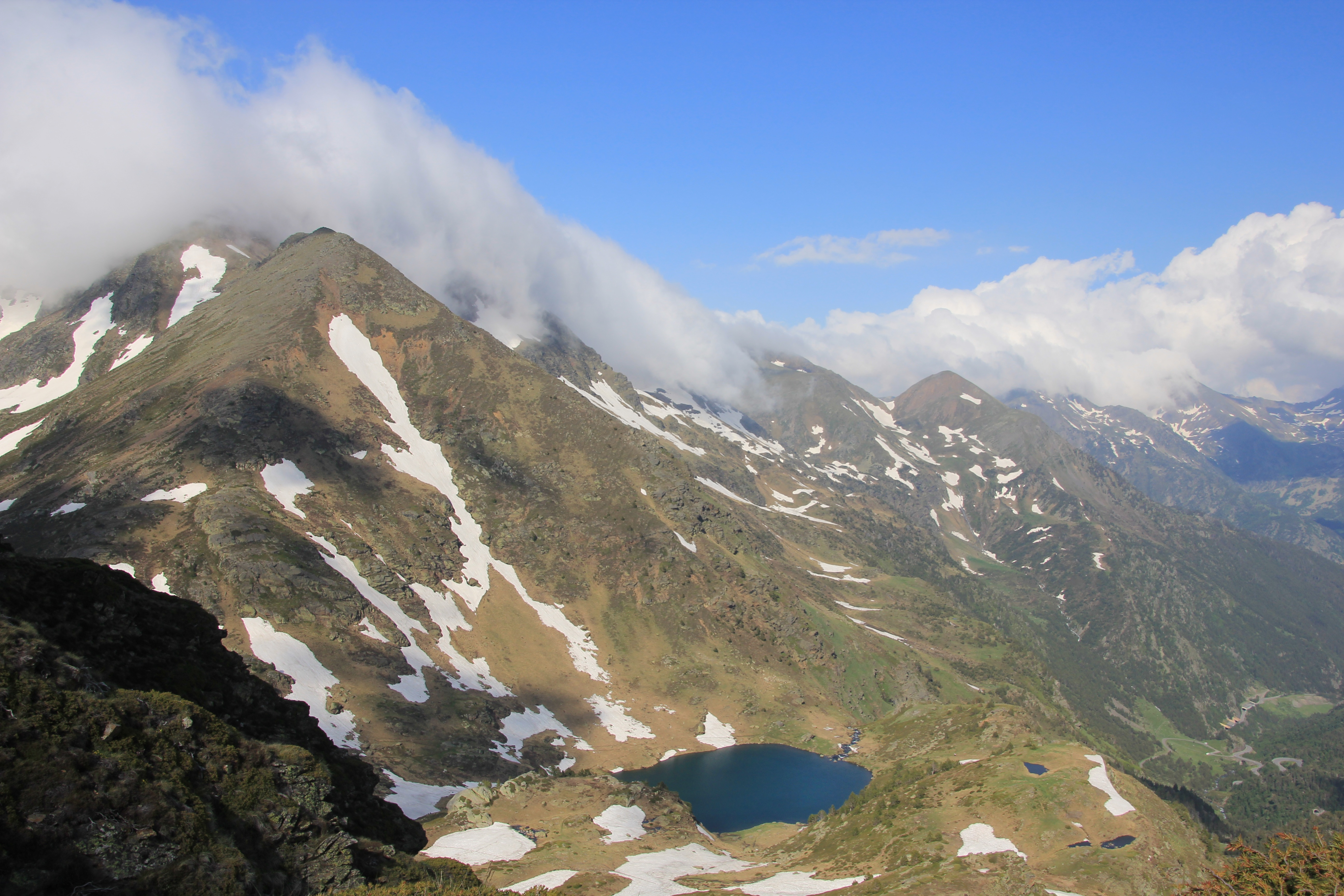 Estany Primer (Ordino) This is a a photo of a lake or pond in Andorra with id: IEA-BE-172